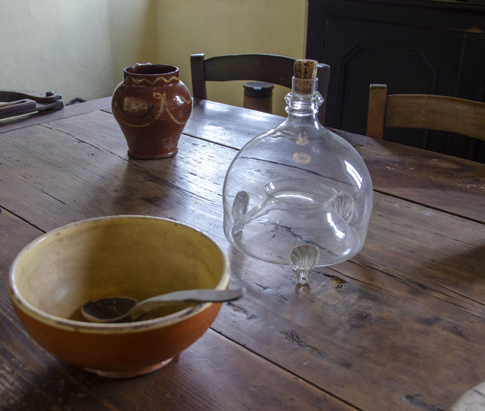 Moschiera - Museo archeologico etnografico di Oleggio